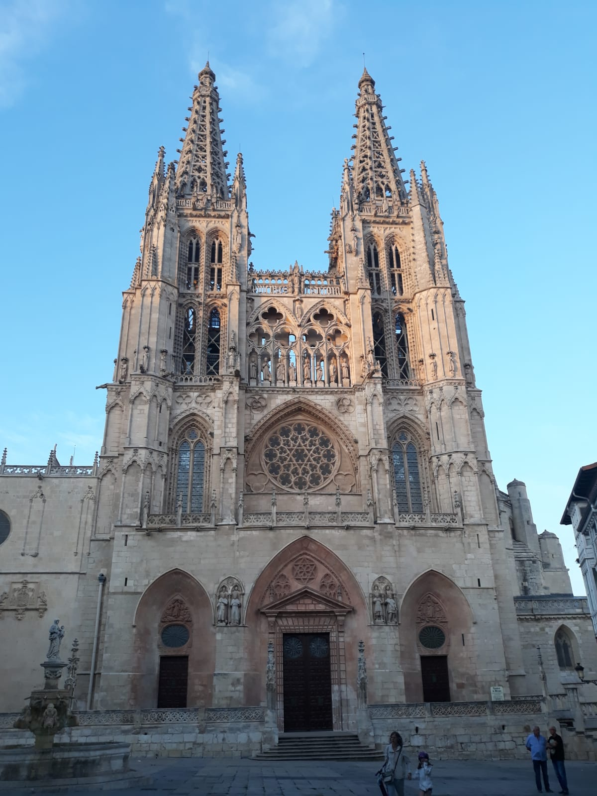 Fachada de la catedral de Burgos (Burgos), construida de 1221 siguiendo las guías góticas de Francia.